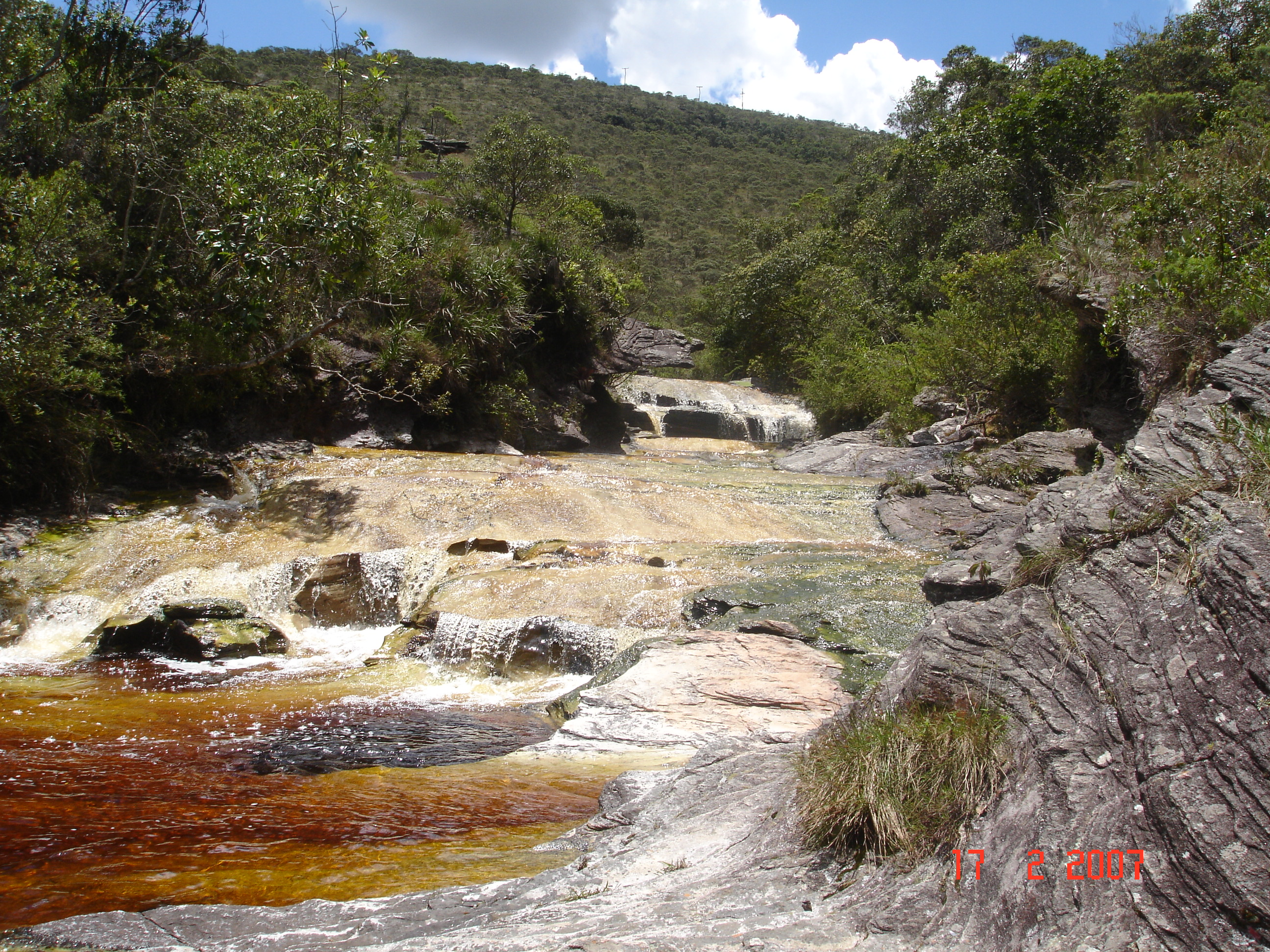 Canhoeira do lago dos espelhos no circuito das águas do Parque Estadual do Ibitipoca, estado de Minas Gerais, Brasil